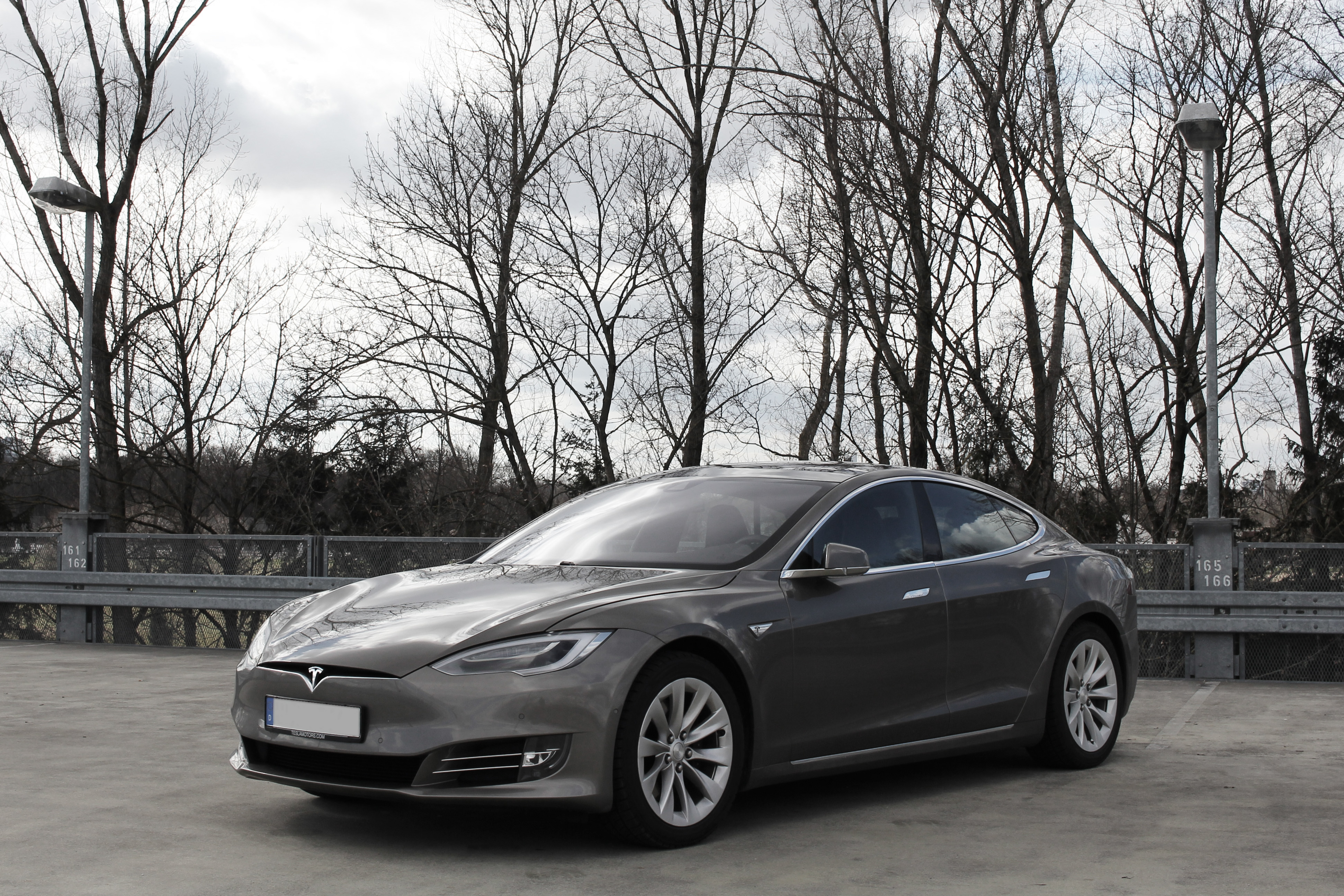 Tesla Model S 90 D